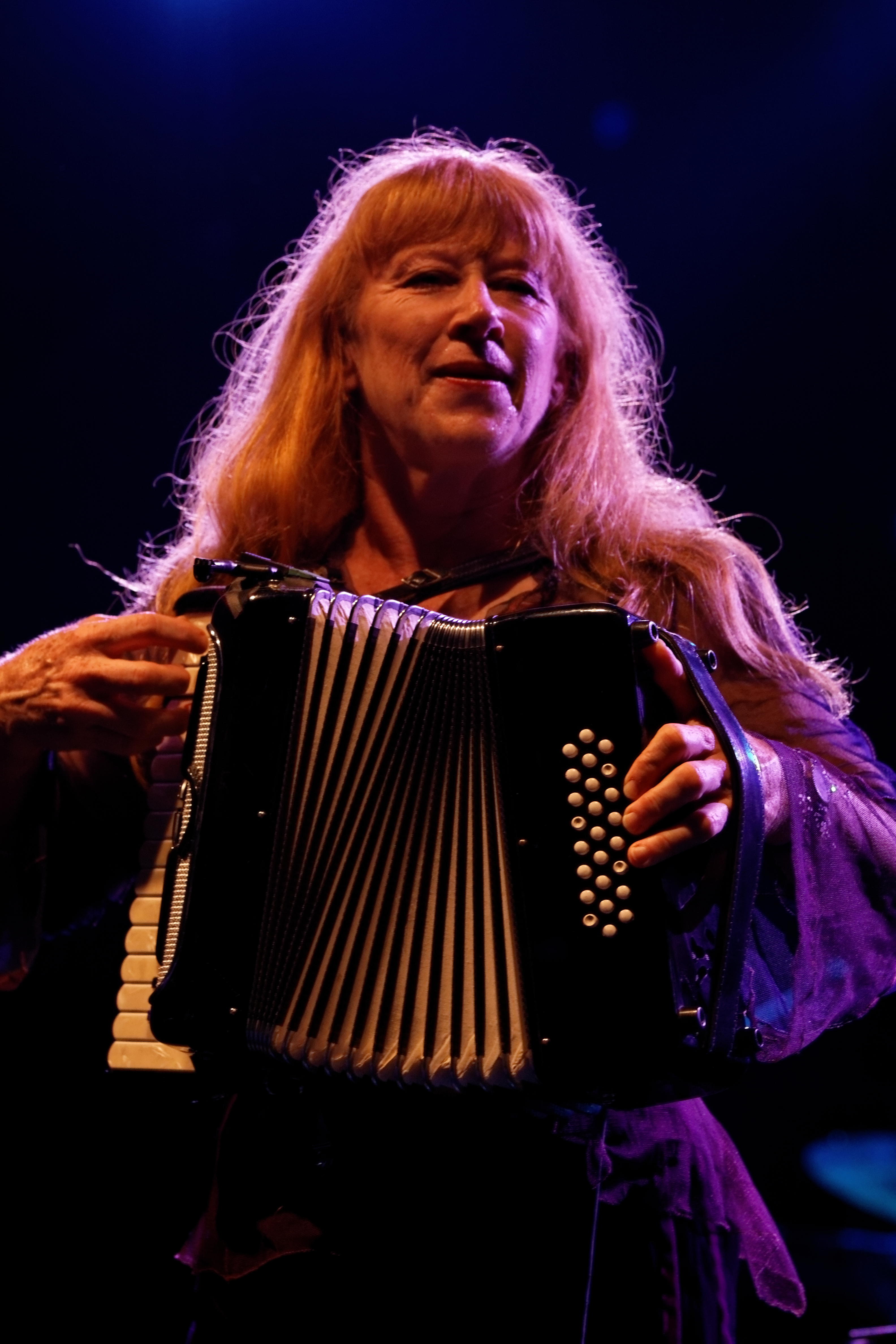 Loreena McKennitt en concert à l'espace Gradlon lors du festival de Cornouaille 2012.